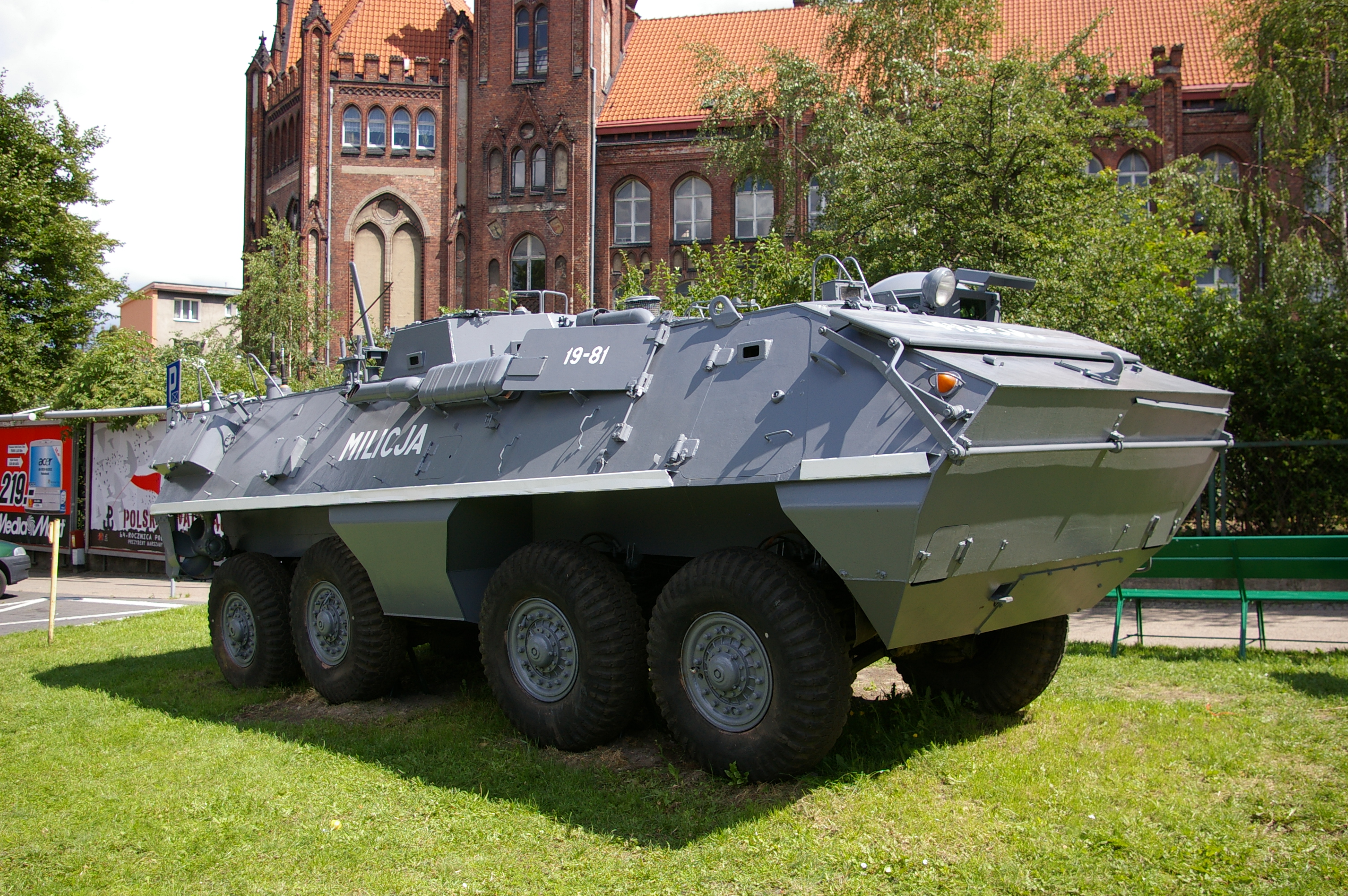 Milicyjny transporter opancerzony SKOT reklamujący wystawę Drogi do Wolności